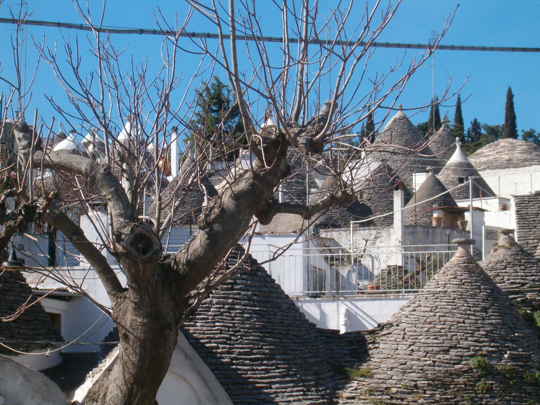 Trulli di Alberobello, Italy